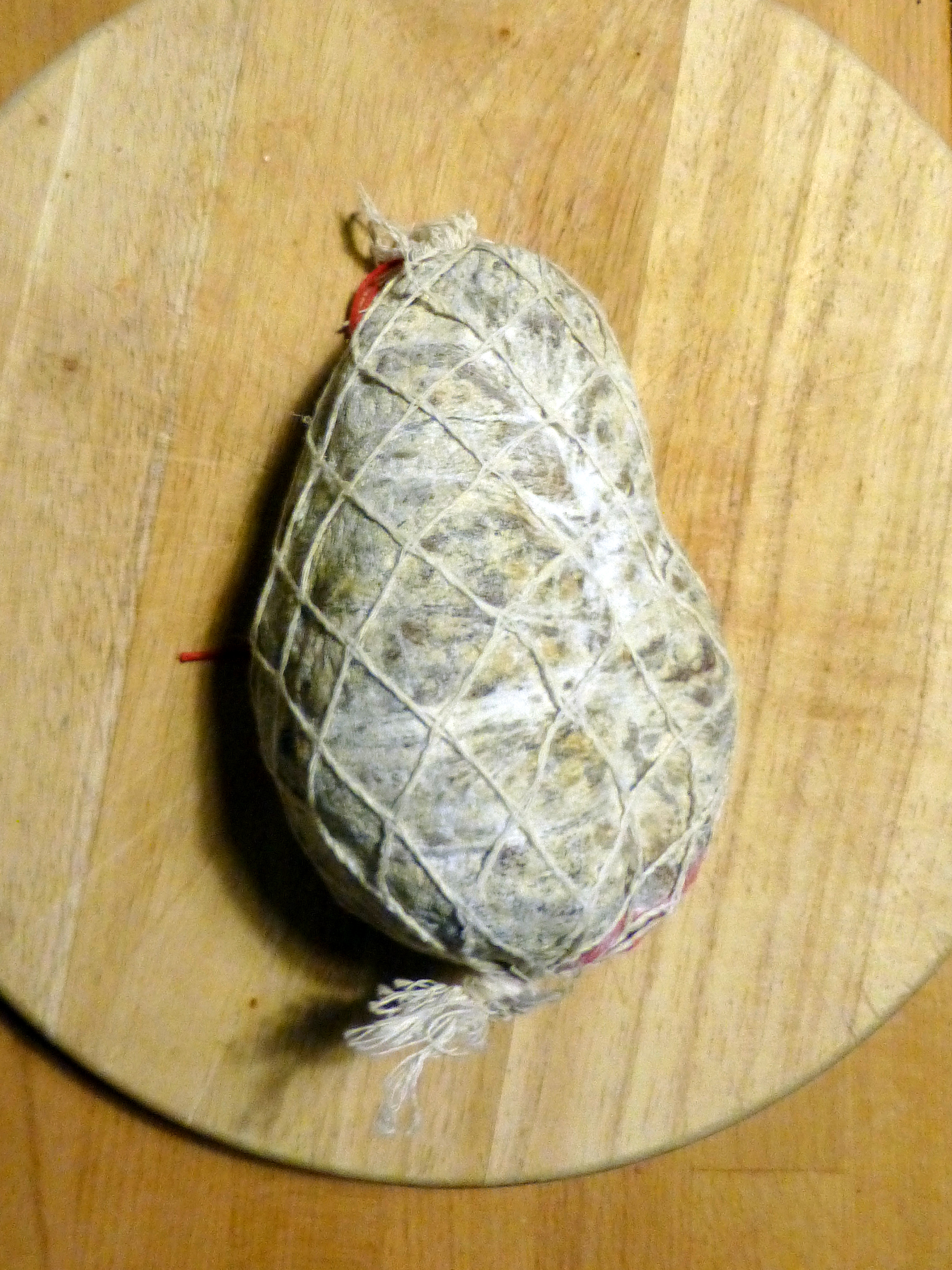 Saucisson Jésus, une spécialité lyonnaise.